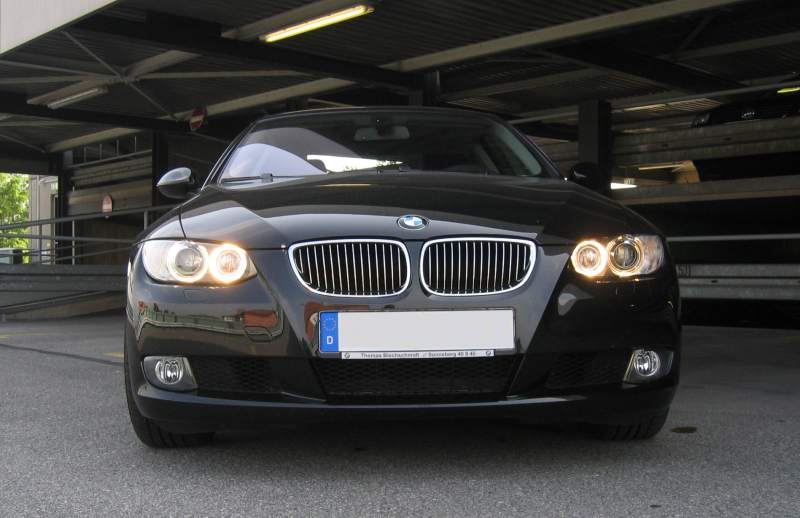 Tagfahrlich des BMW Coupé (E92)